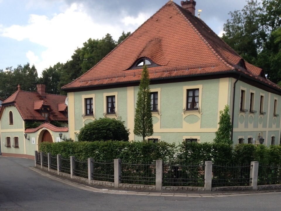 Schloß Zintlhammer zur heutigen Zeit sehr gut erhalten